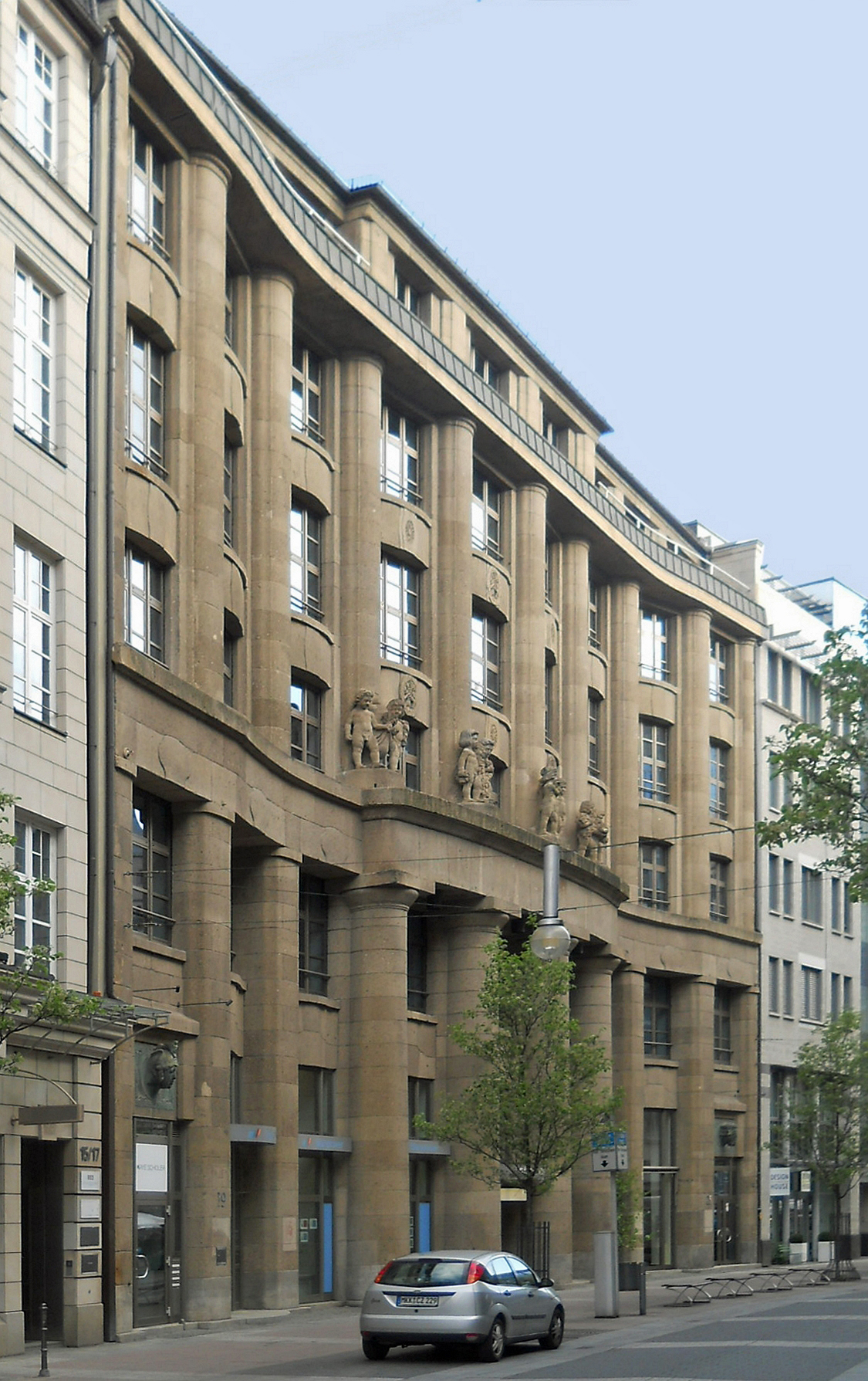 Frankfurter General-Anzeiger, Frankfurt am Main, Geschäftshaus Schillerstraße 19-25